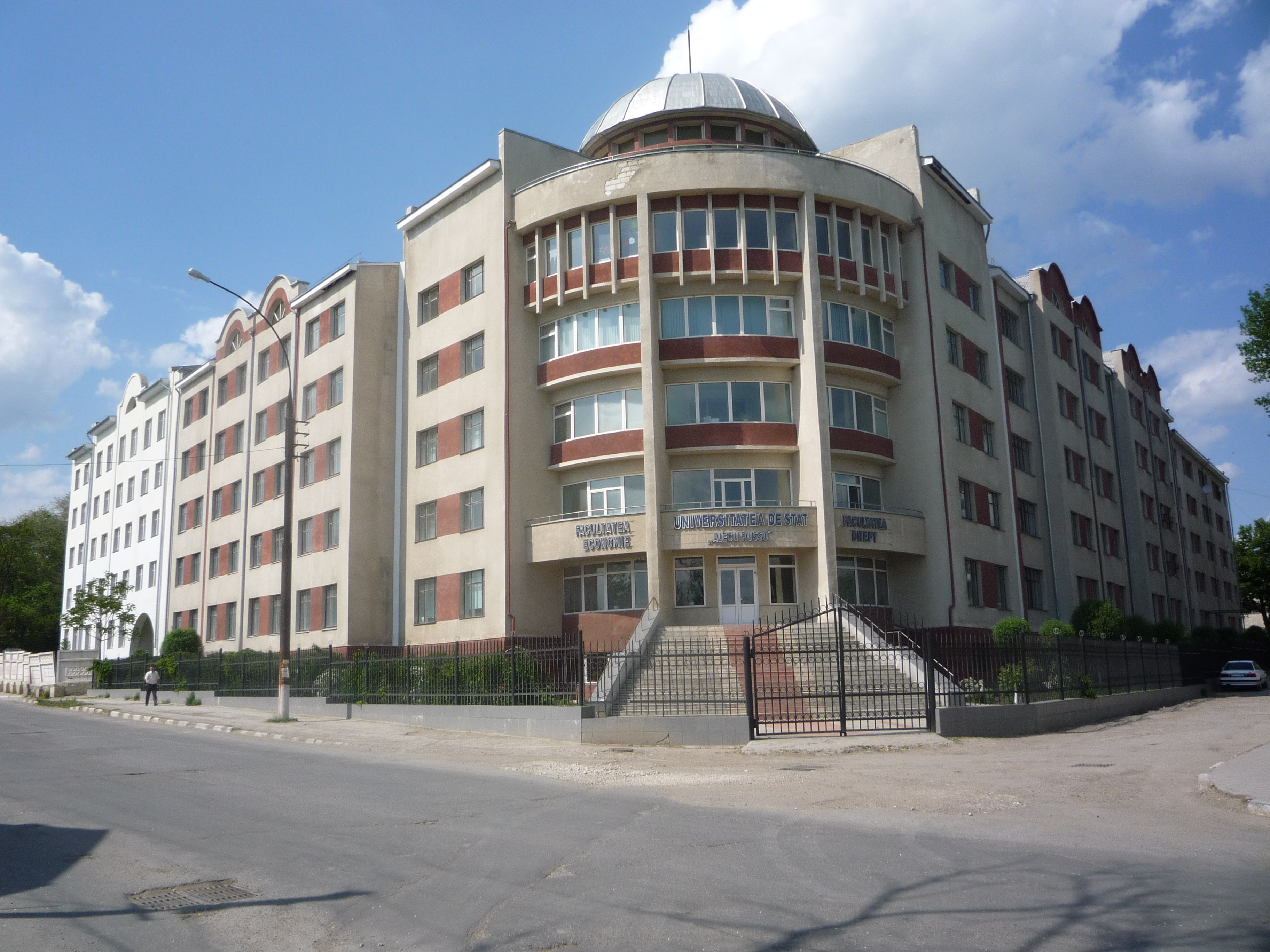 Facultatea Economie si Drept. USB